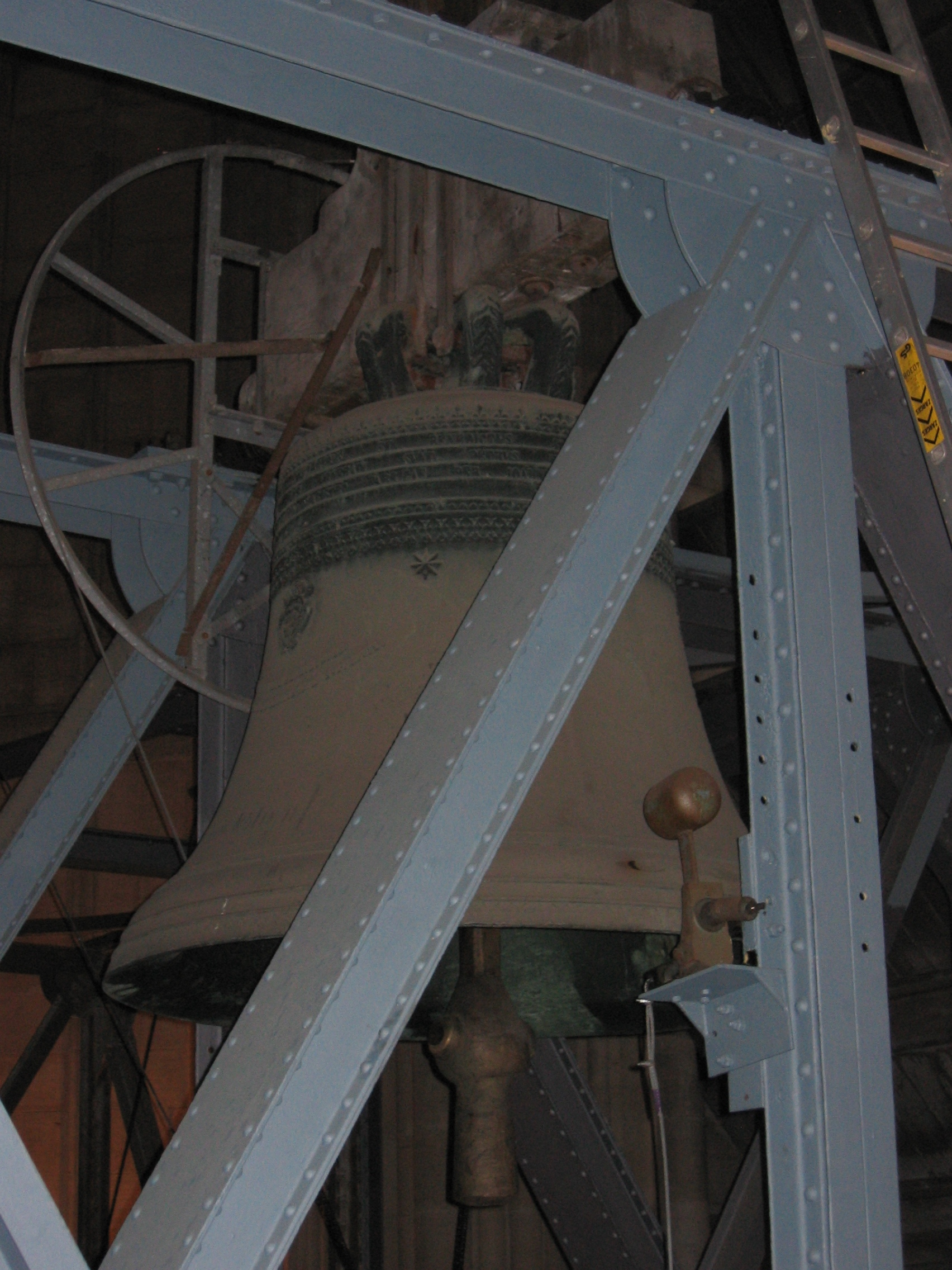 Description – Dreikönigenglocke. Viertgrößte Glocke des Kölner Domes. Source – own work“ Date – Sommer 2006. Author – Andreasdziewior